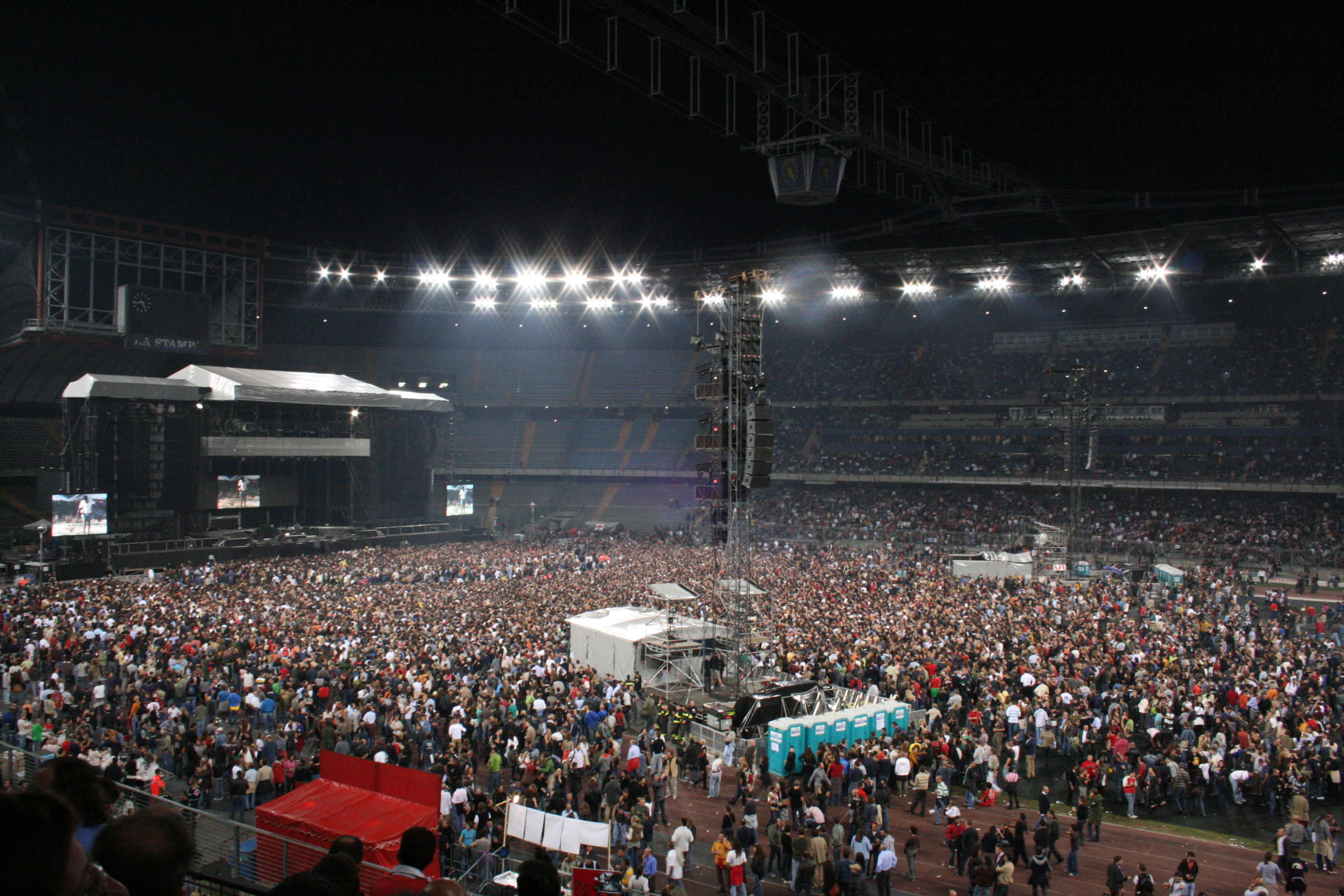 Stadio delle Alpi, full house